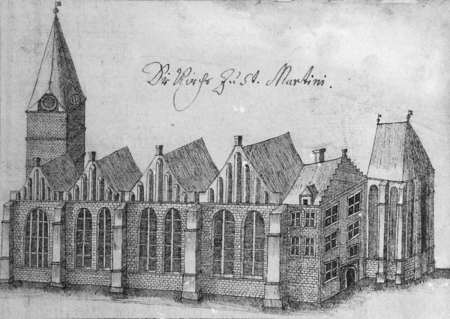 Focke-Museum Bremen: Martini-Kirche. Ausschnitt: Plan der Stadt Bremen, 1734. Federzeichnung von Johann Daniel Heinbach Focke-Museum Native nameFocke-MuseumLocationBremen, GermanyCoordinates53° 05′ 33″ N, 8° 51′ 51″ E Established1918/1959Website control : Q1434990 VIAF: 124811512 ISNI: 0000 0001 2353 0539 LCCN: n83199524 GND: 39040-9 SUDOC: 079226906 WorldCat